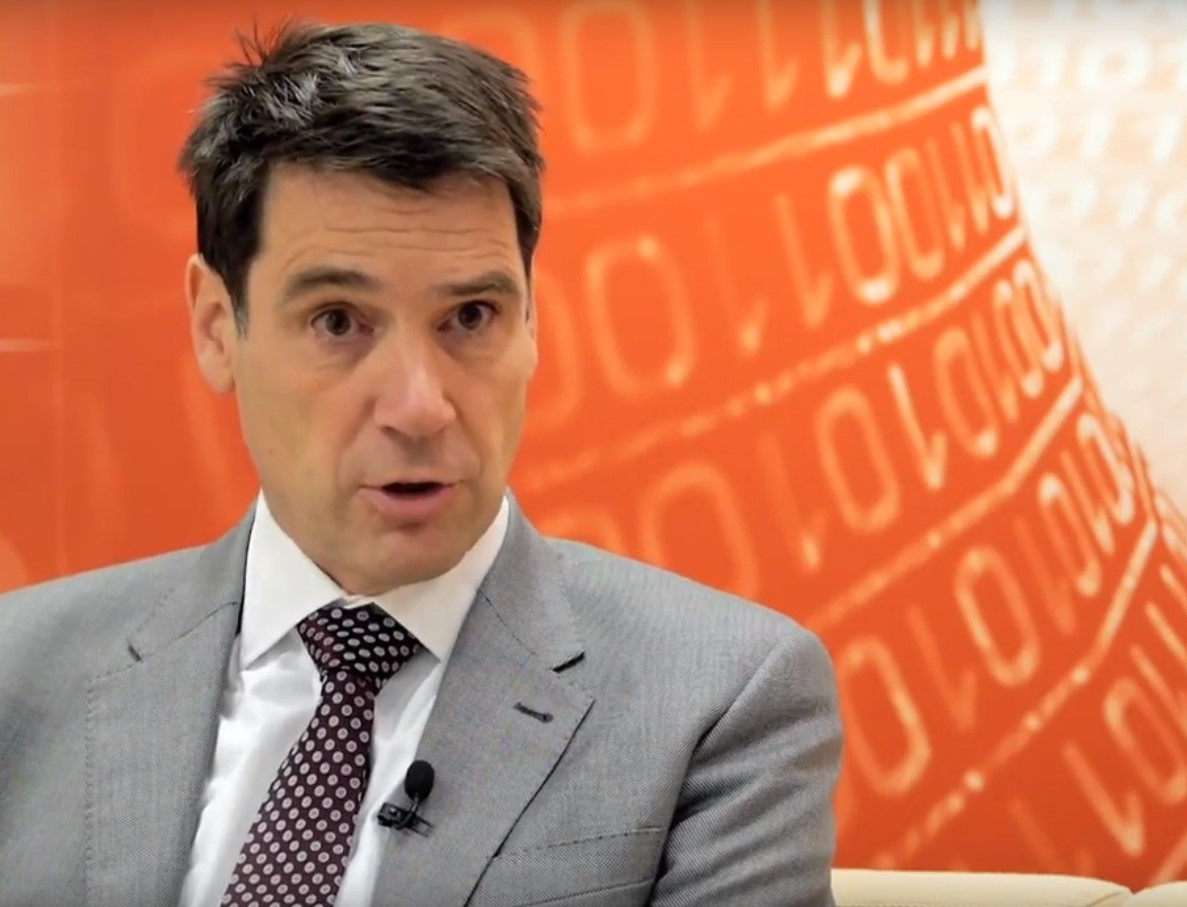 Coen Teulings. Dit interview is opgenomen met dank aan Duisenberg School of Finance in Amsterdam.